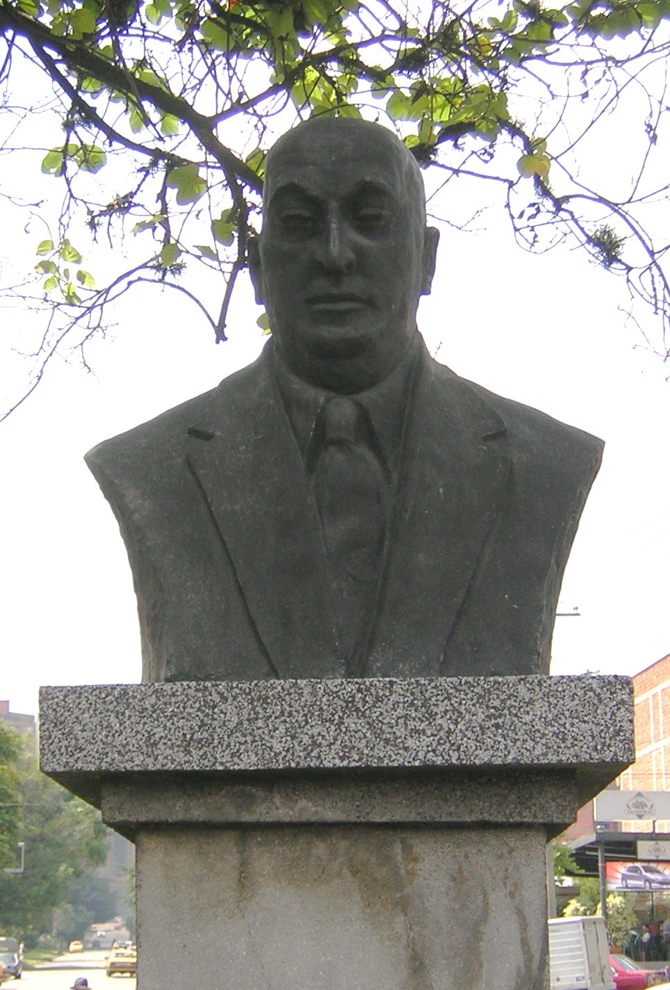 Busto de Gilberto Alzate Avendaño, ubicado en la glorieta de Santa Gema, Medellín, Colombia